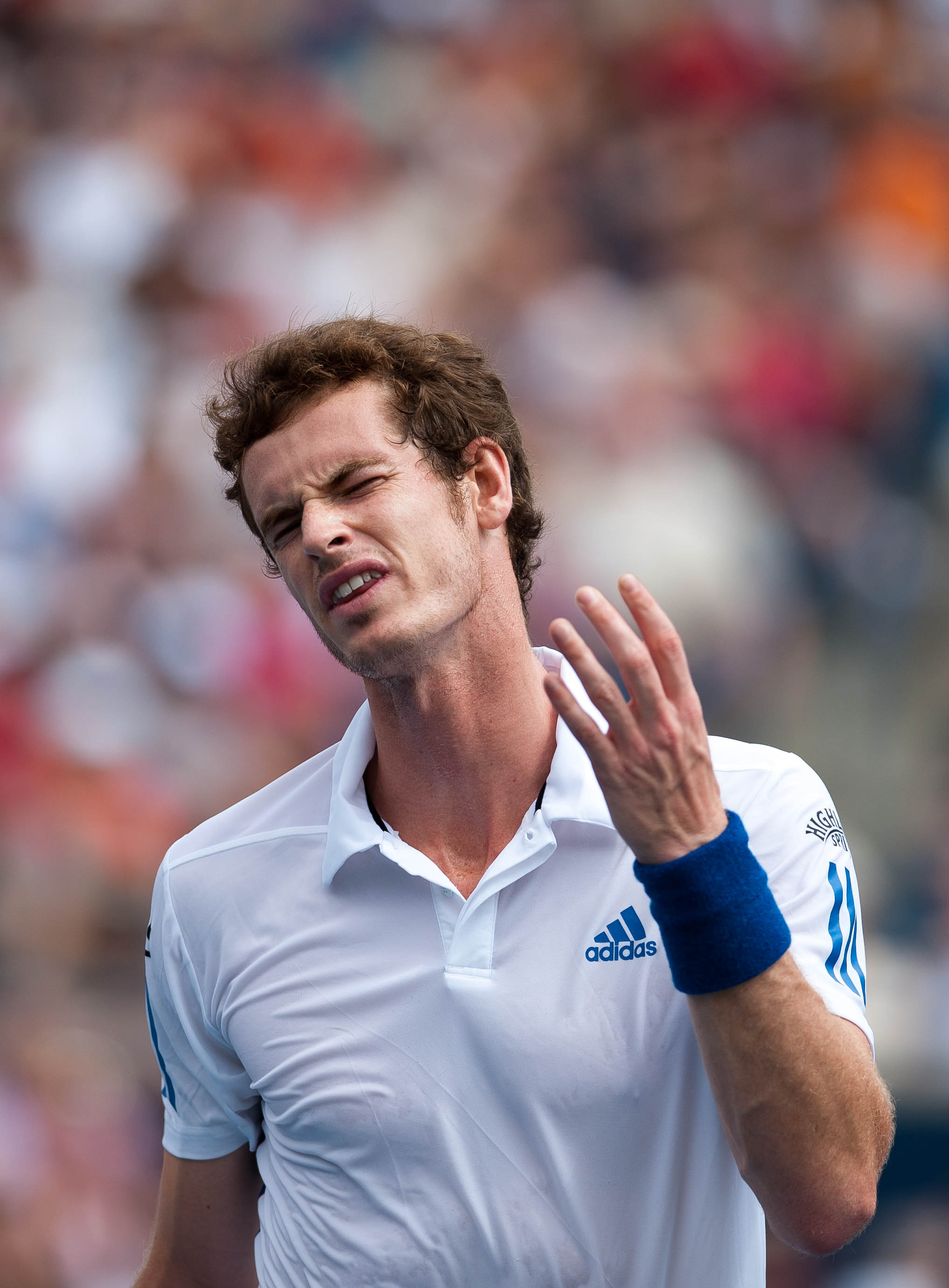 Why, against Roger Federer